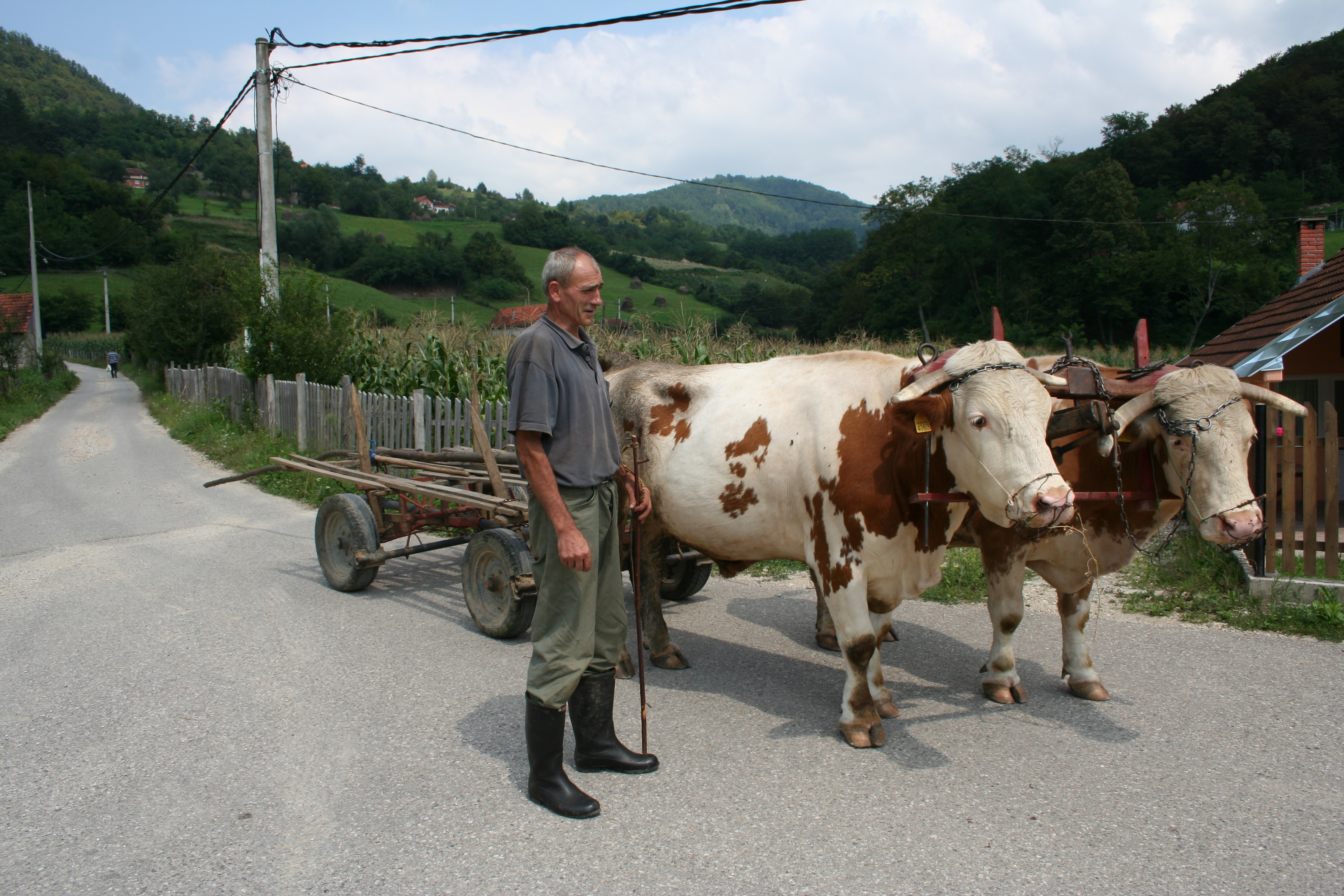 Volovska zaprega, Donja Trešnjica